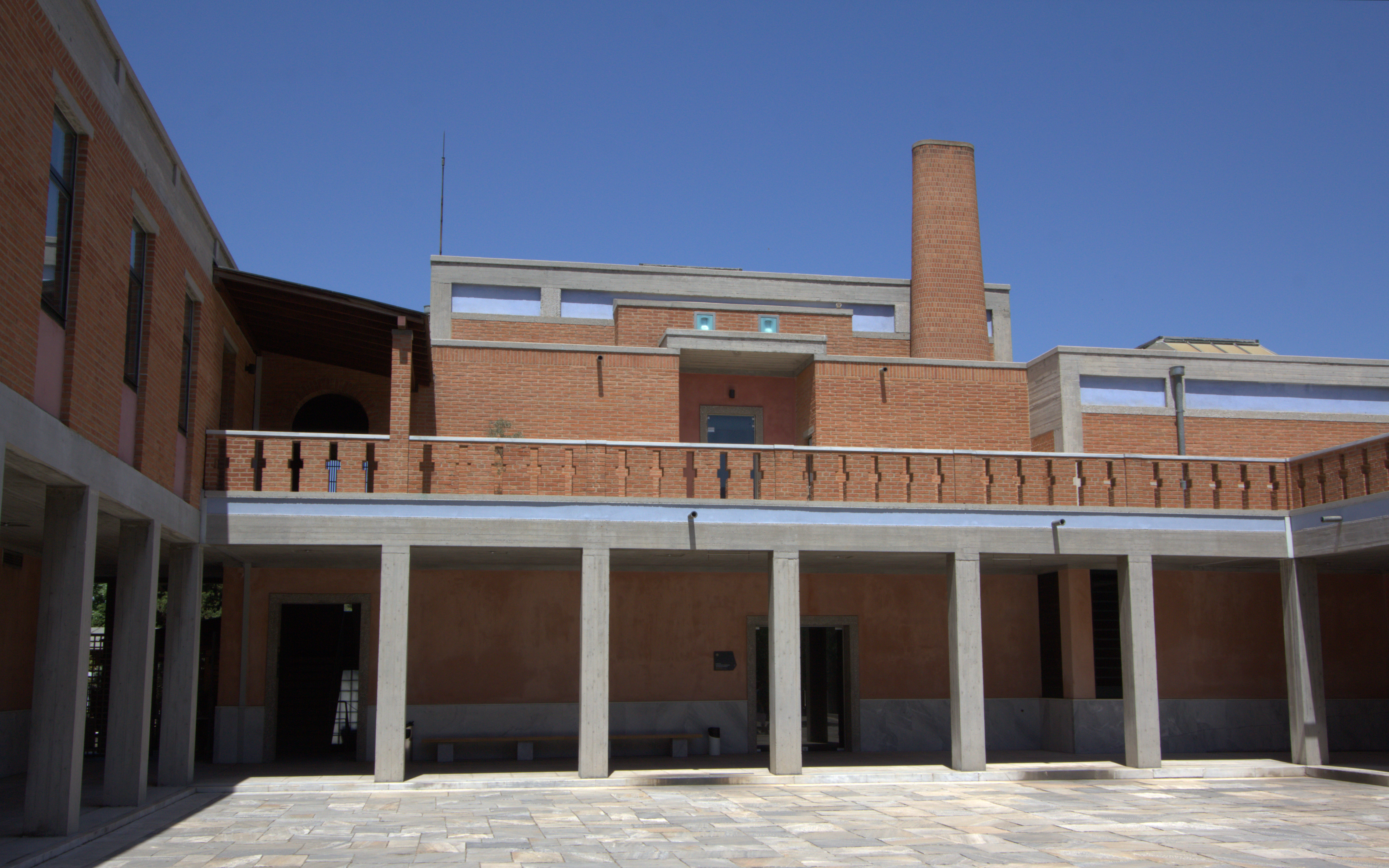 Μουσείο Βυζαντινού Πολιτισμού, Θεσσαλονίκη.